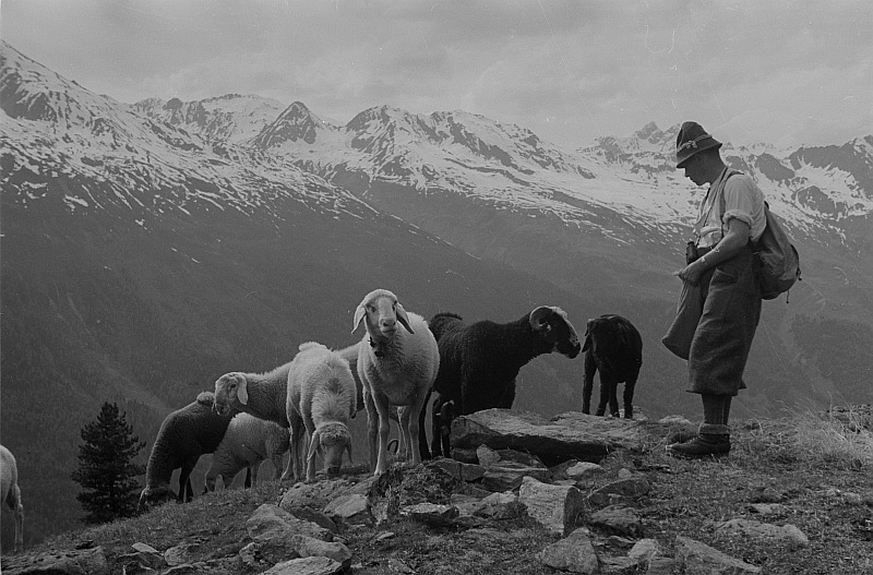 Original image description from the Deutsche Fotothek Schafherde und Hirte? im Ötztal